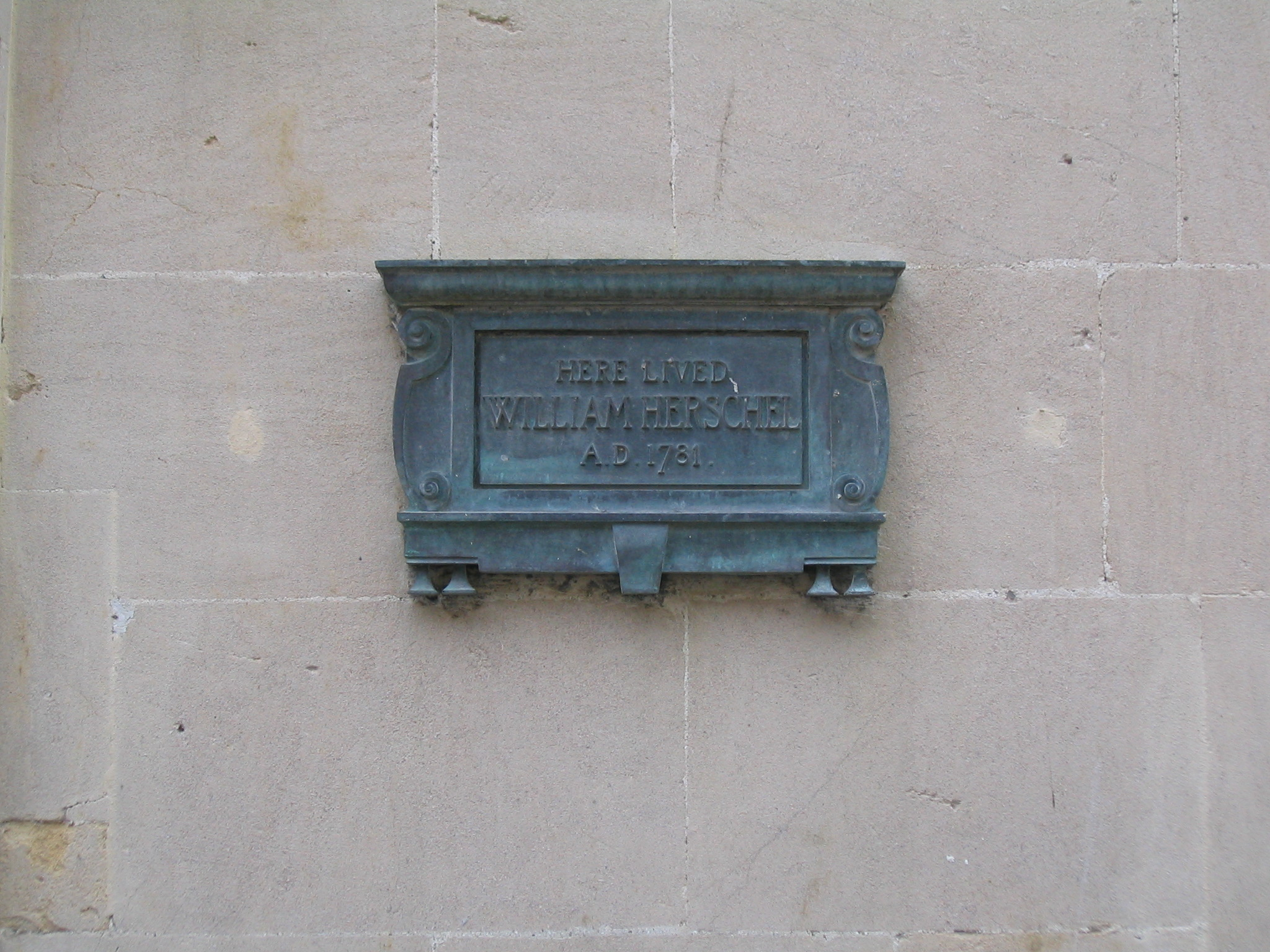 Gedenkplatte am ehemaligen Wohnhaus von Wilhelm Herschel